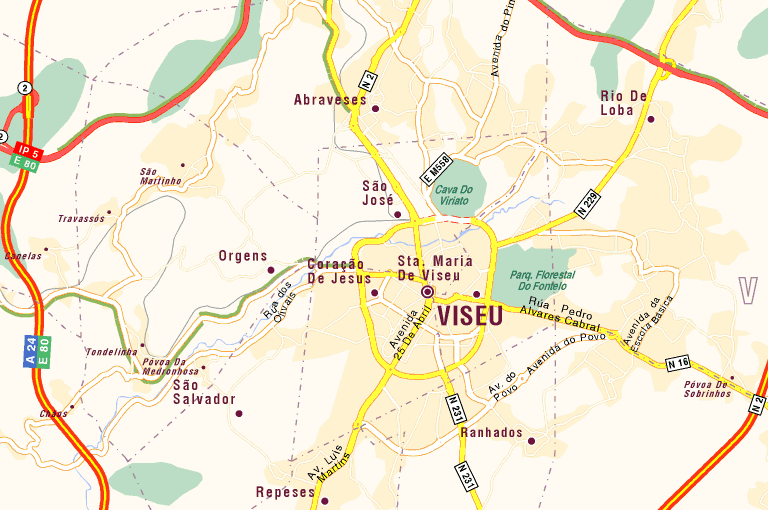 Mapa de Viseu